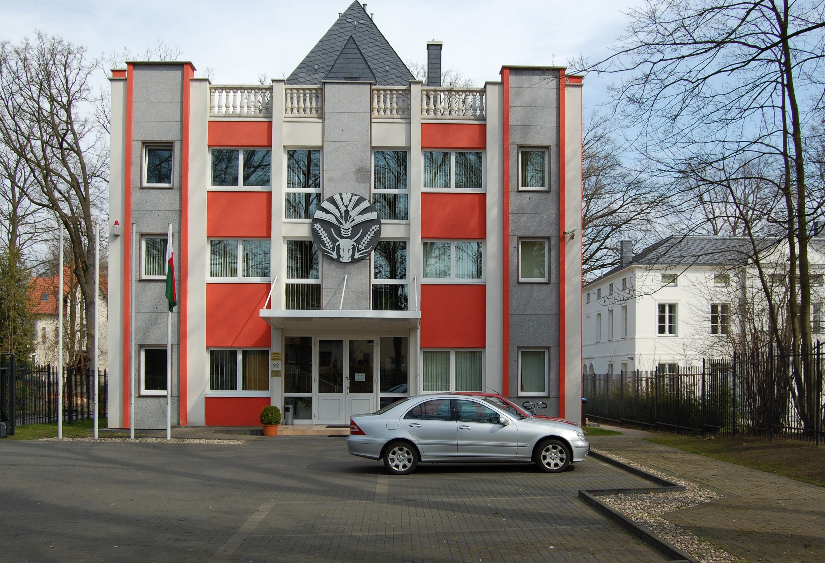 Embassy of Madagascar in Falkensee near Berlin, Germany